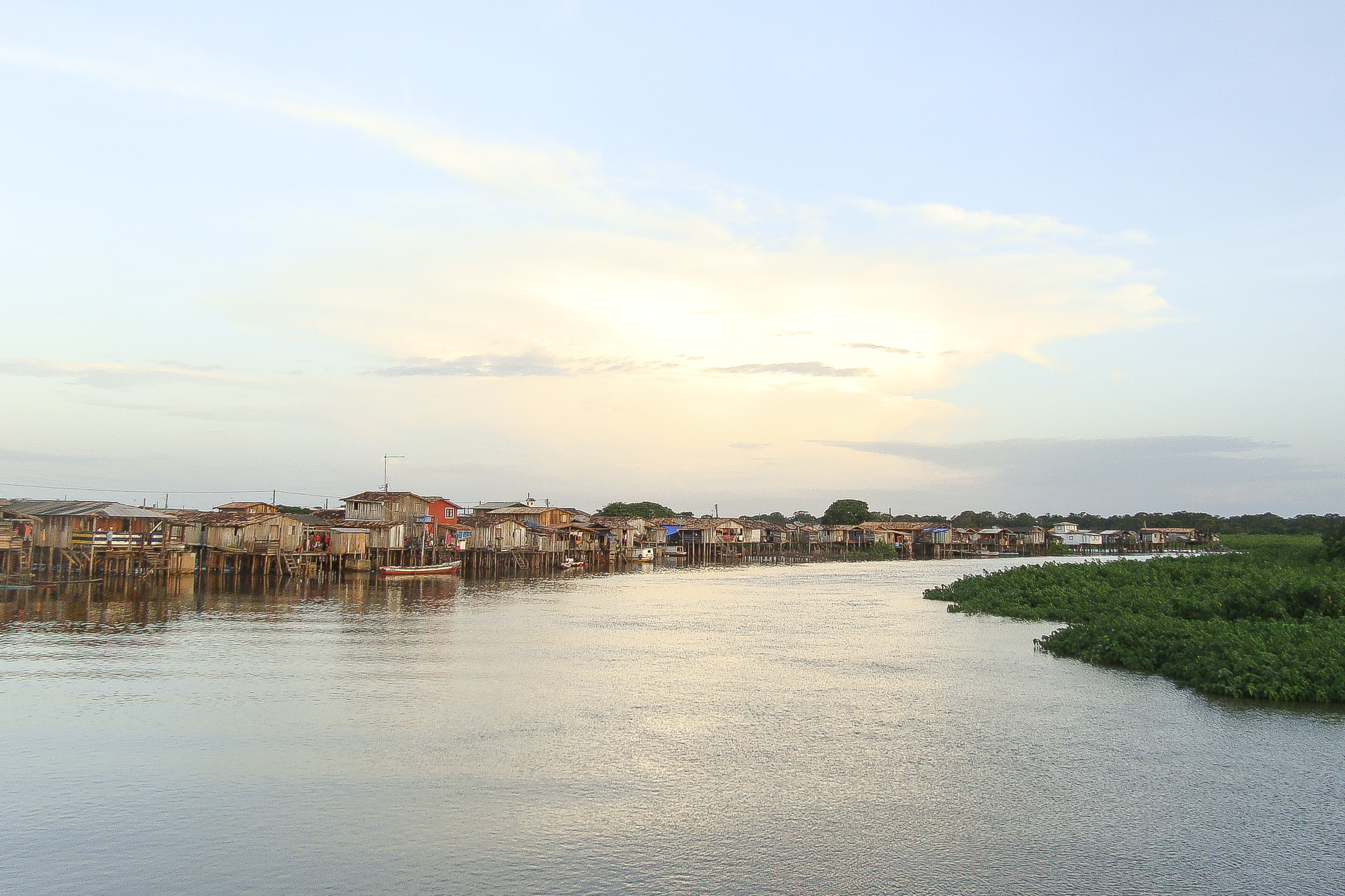 Santa Cruz do Arari, Ilha do Marajó - Pará - Brasil.